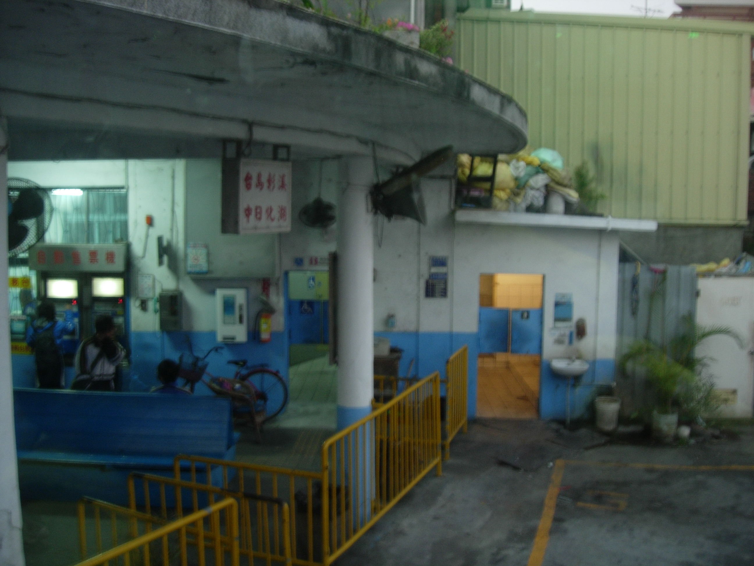 中文（台灣）: 員林客運二林站月台全景